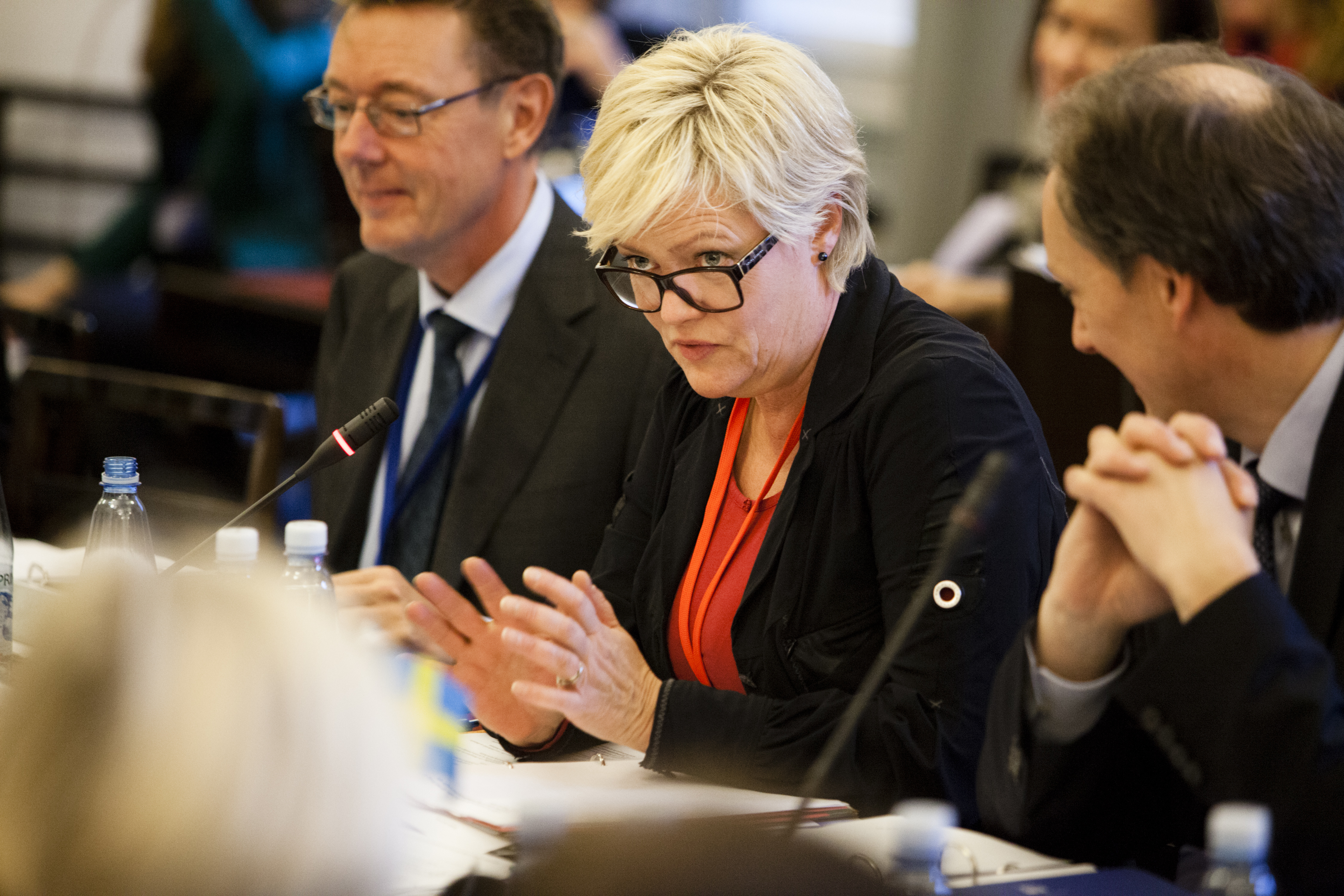 MR-U 02/12 Möte i ministerrädet for utbildning och forskning i förbindelse med Nordiska rädets 64:e session i Helsingfors. Kristin Halvorsen, Norge.